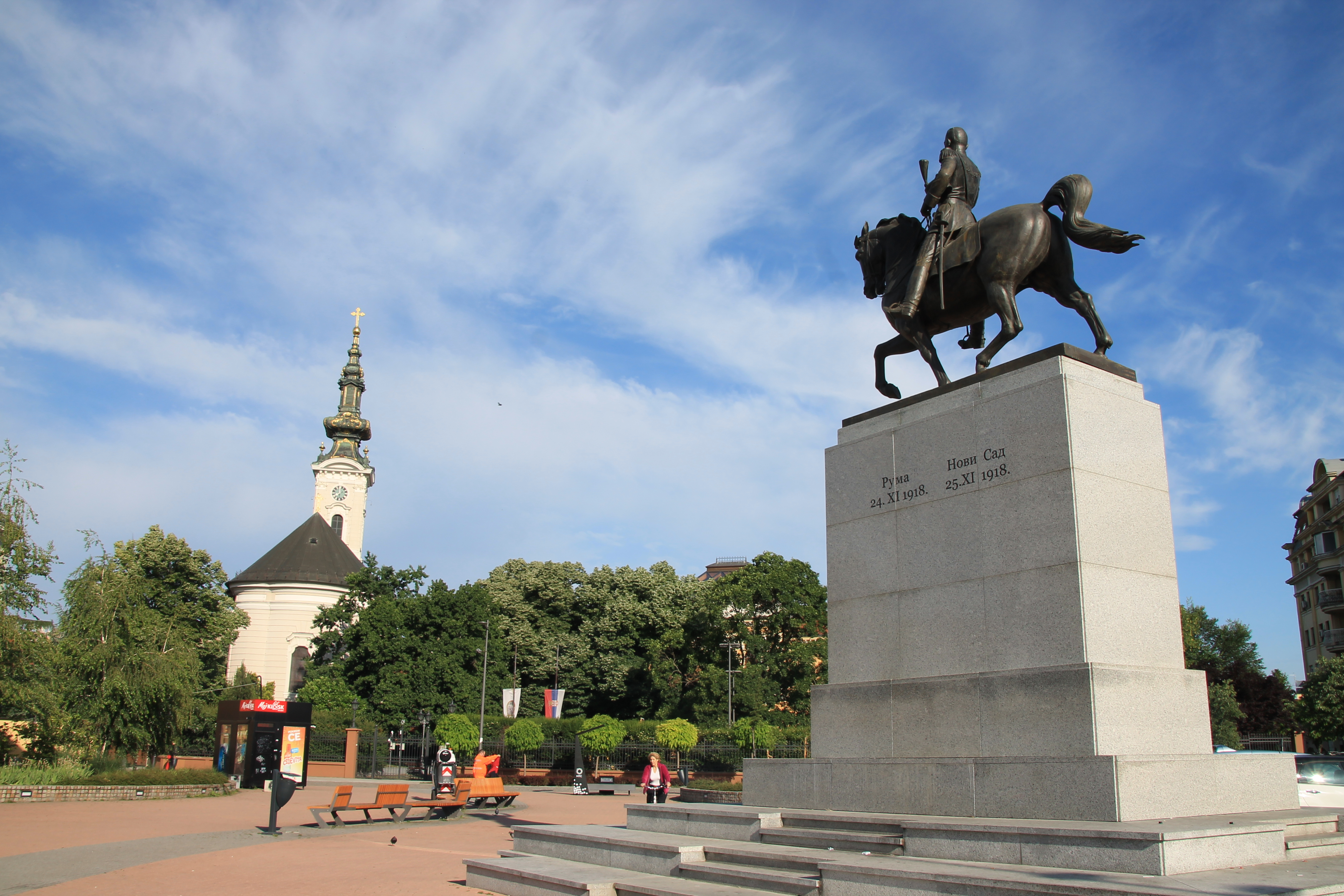 TTrg Republike (Novi Sad)rg Republike (Novi Sad)